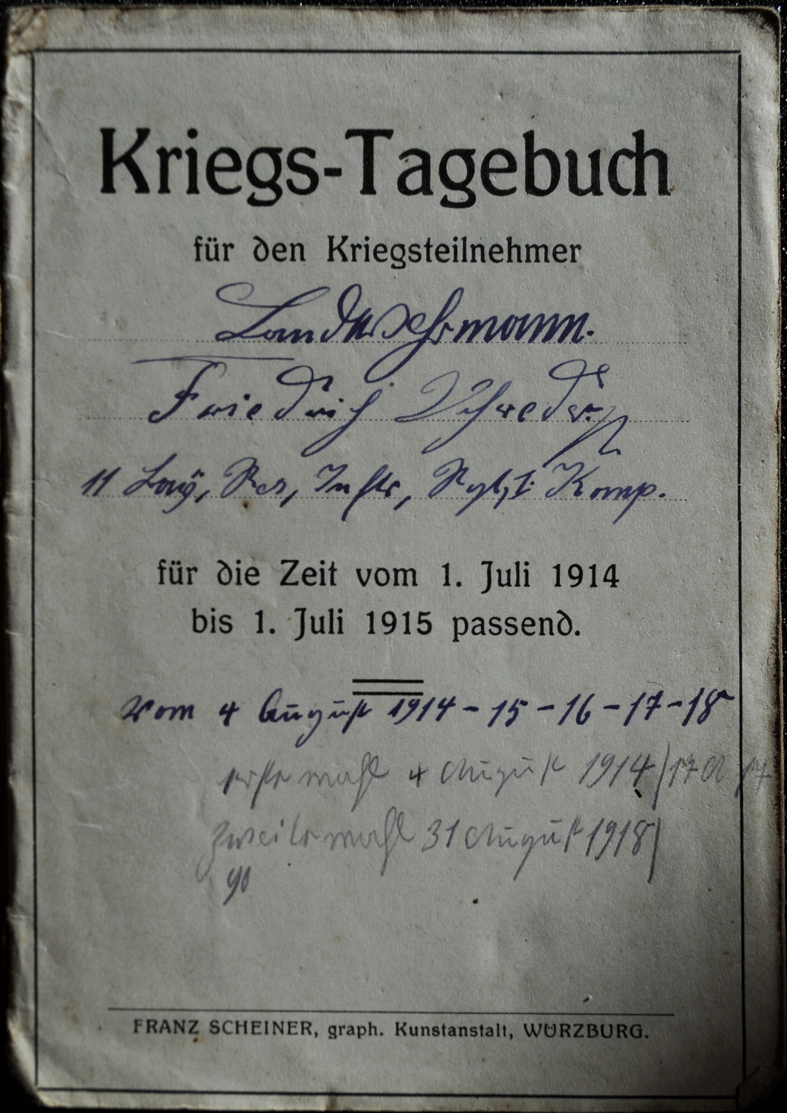 Kriegstagebuch mit Kalender von 1914-1915 von Friedrich Schröder.